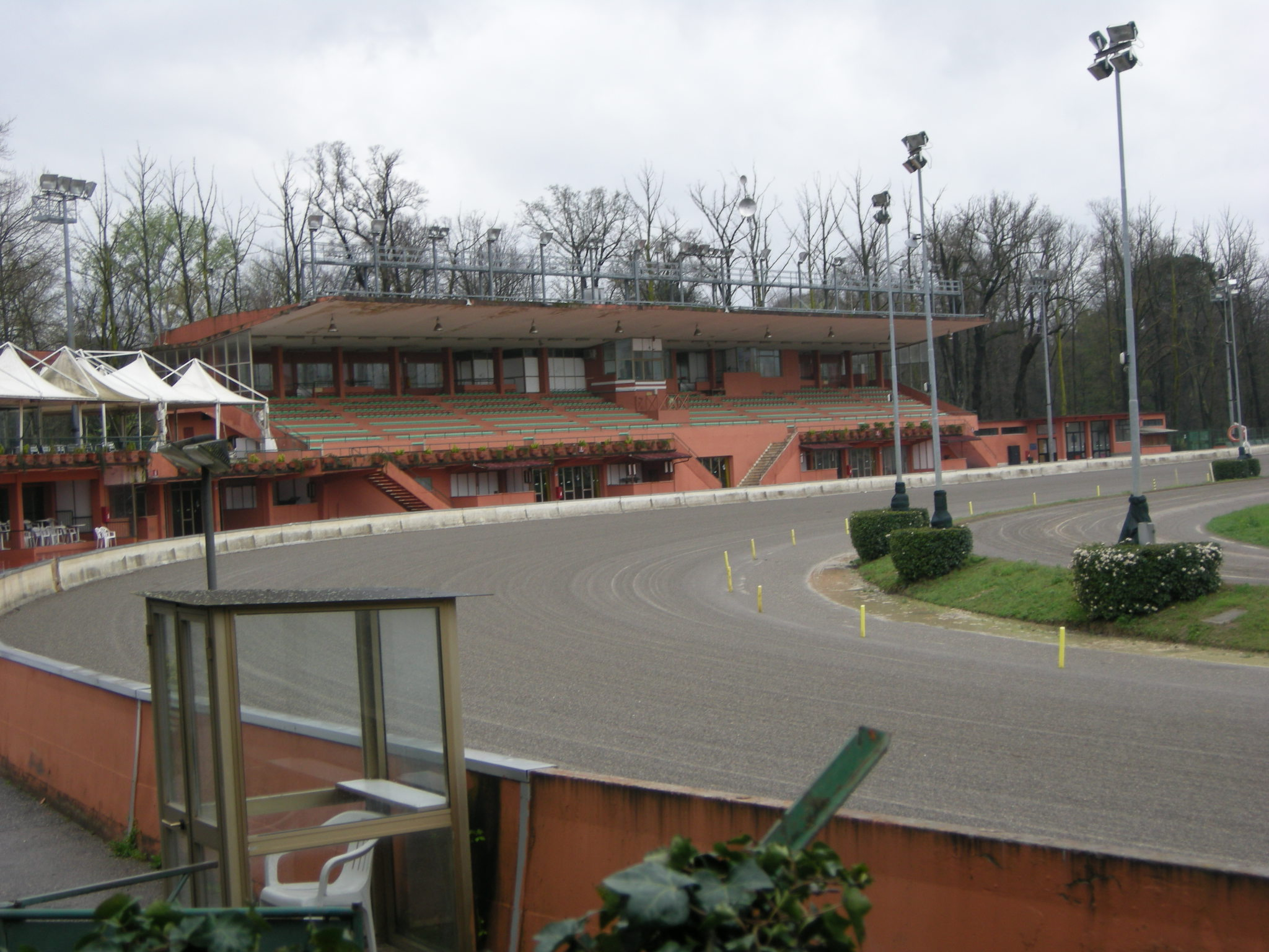 Ippodromo del trotto delle cascine